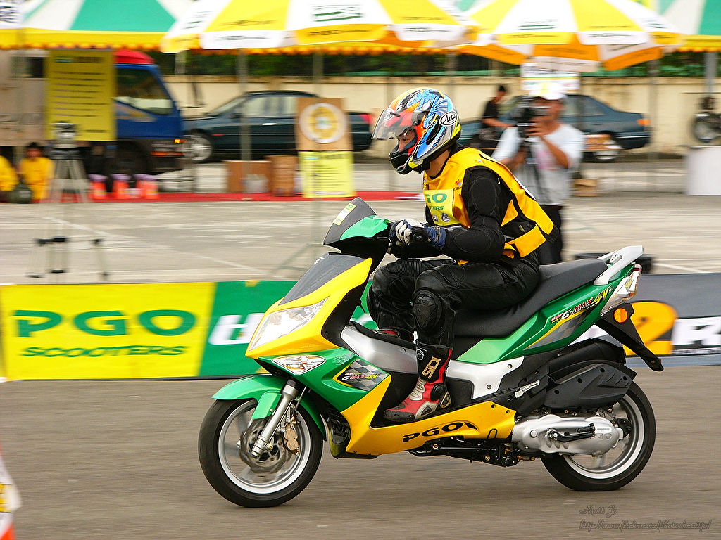 PGO G-MAX 4V